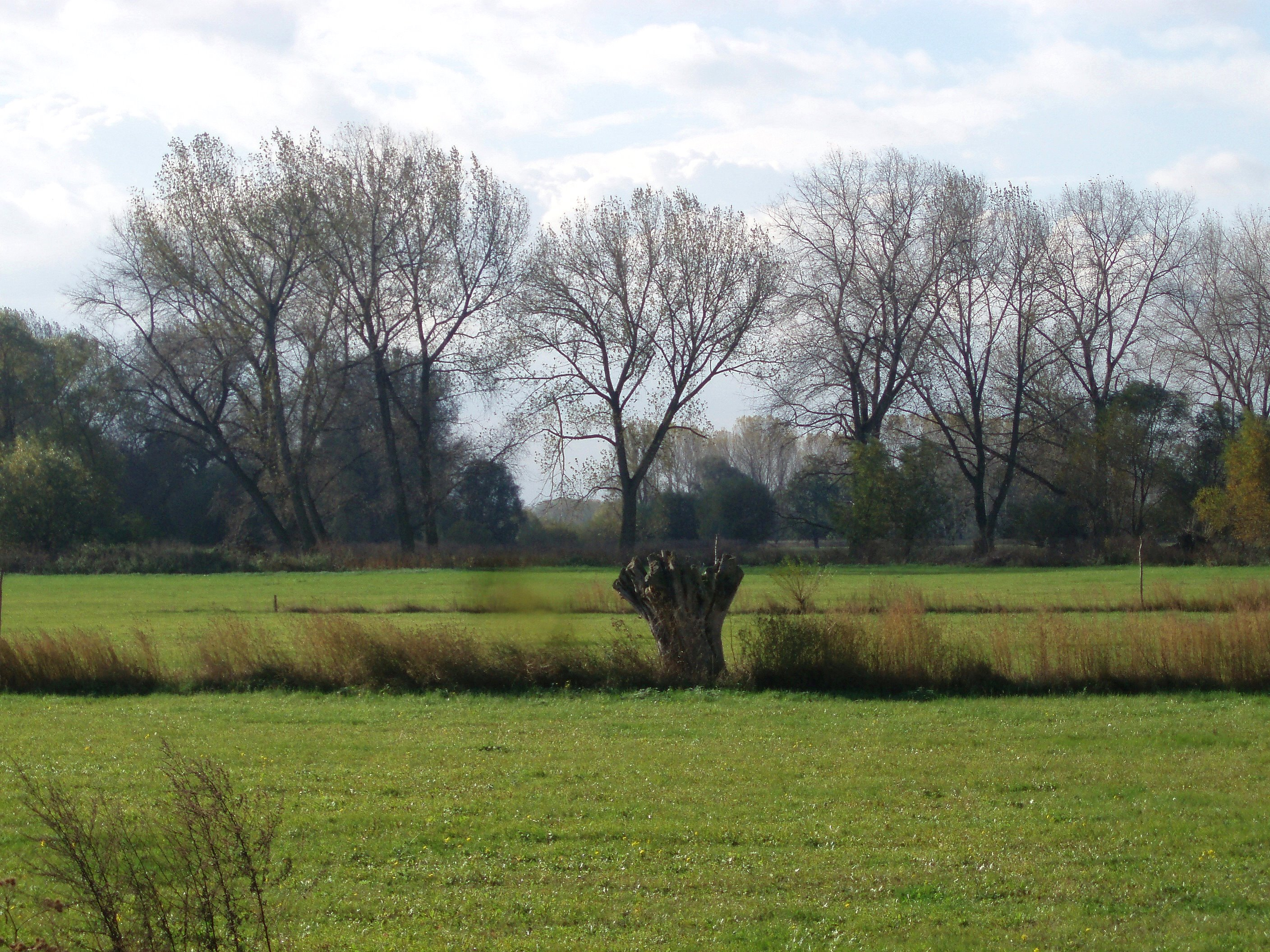 Elsteraue bei Reuden Urheber: selbst erstellt